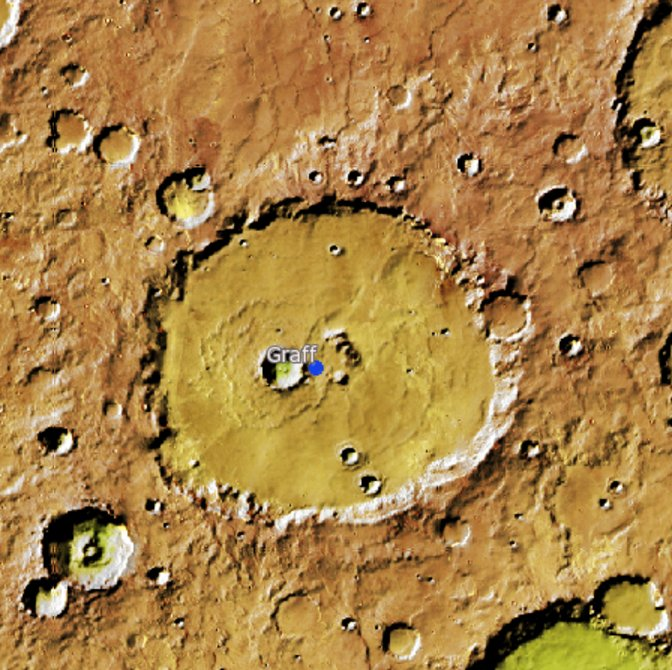 Cráter Marciano Graff. (Imagen IAU/USGS/Goddard/A SU/USGS)